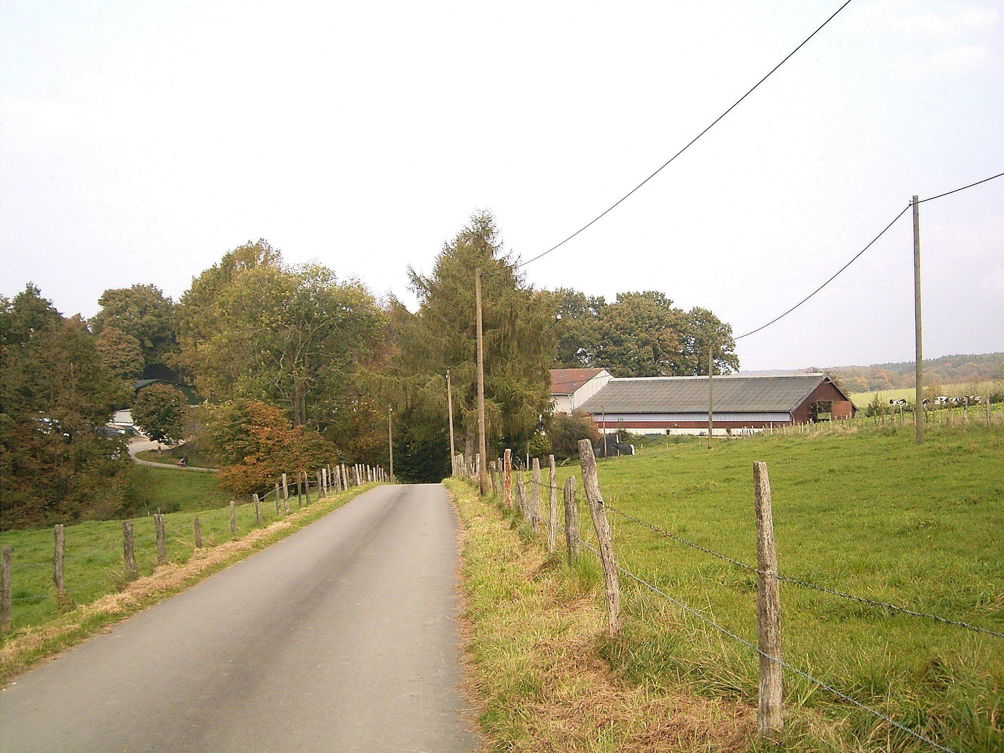 Radevormwald